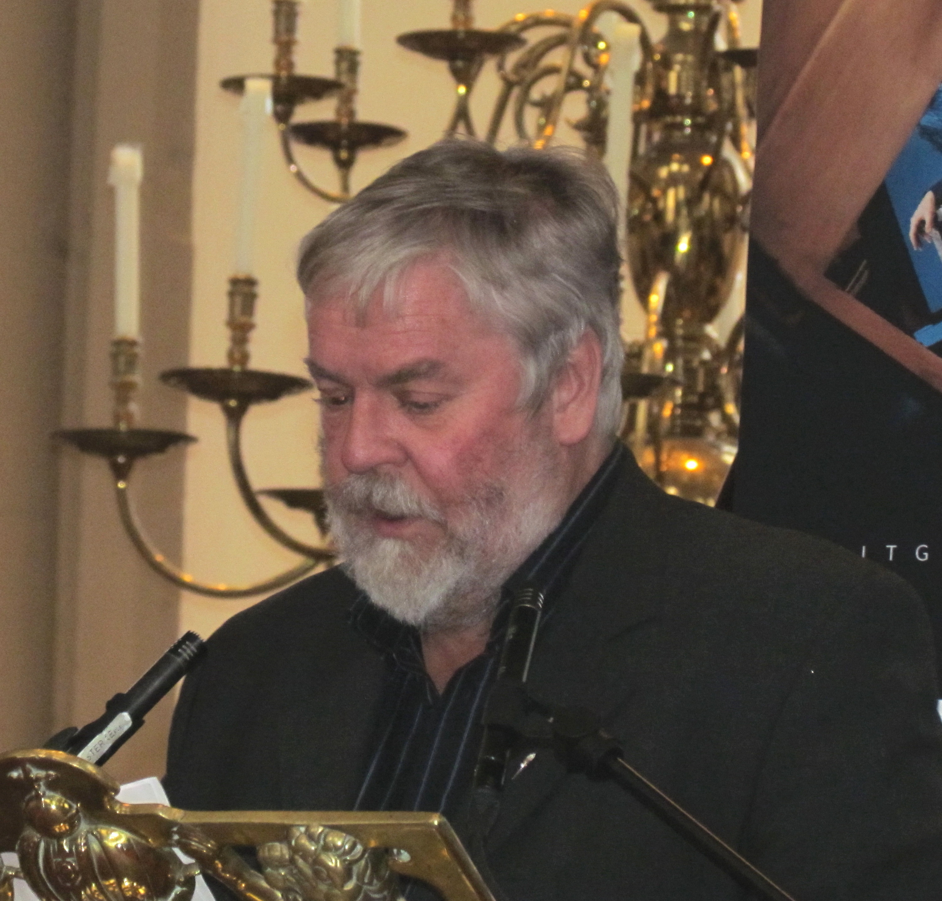 Kees de Bakker, oprichter en directeur van Uitgeverij Conserve, houdt een toespraak bij de presentatie van het boek 'De vader en de zoon' van Peter ter Velde